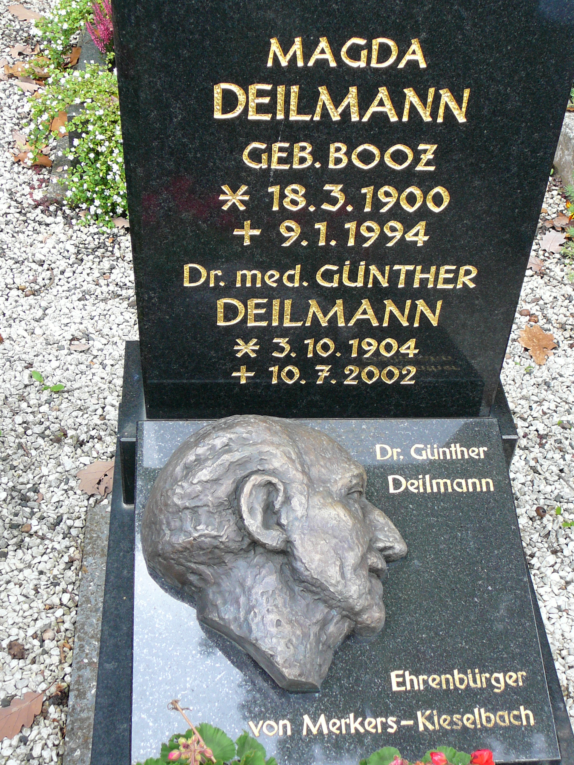 Bild Grab Dr. Günther Deilmann